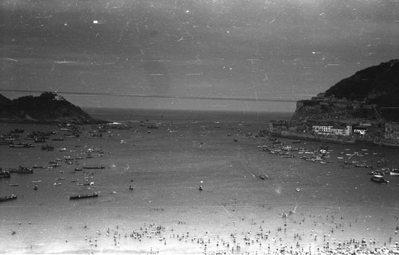 Loiolatarrako trainerua, 1943ko Kontxako Banderan, Santander eta Orioekin batera.